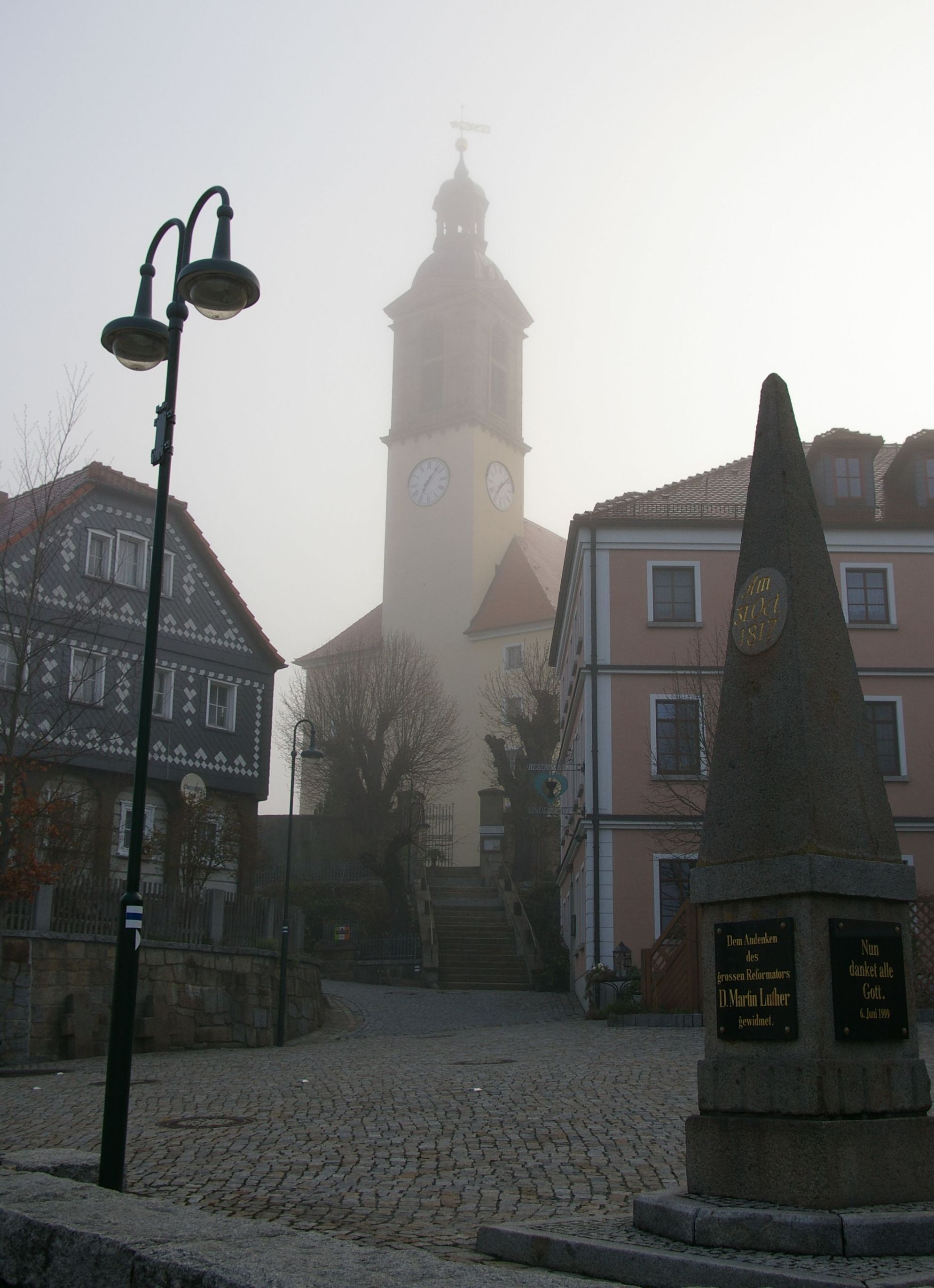 Markt mit Kirche in Sohland